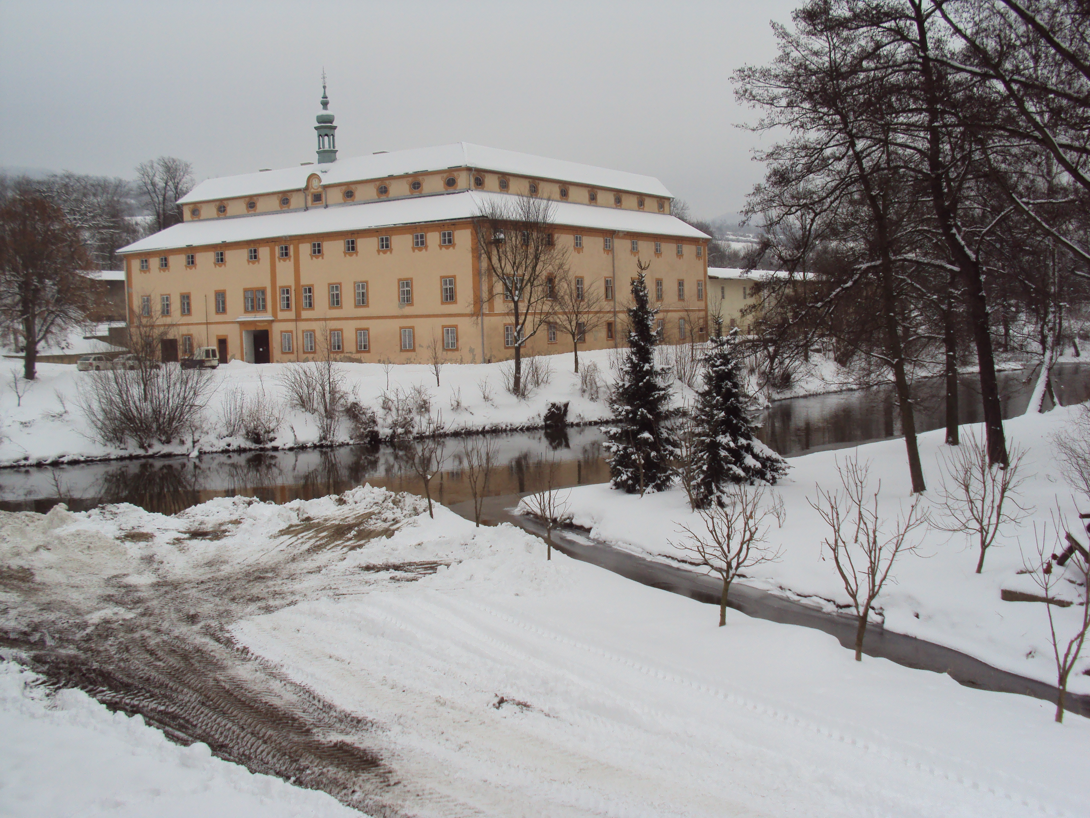 Zámek v Horní Polici nad Ploučnicí